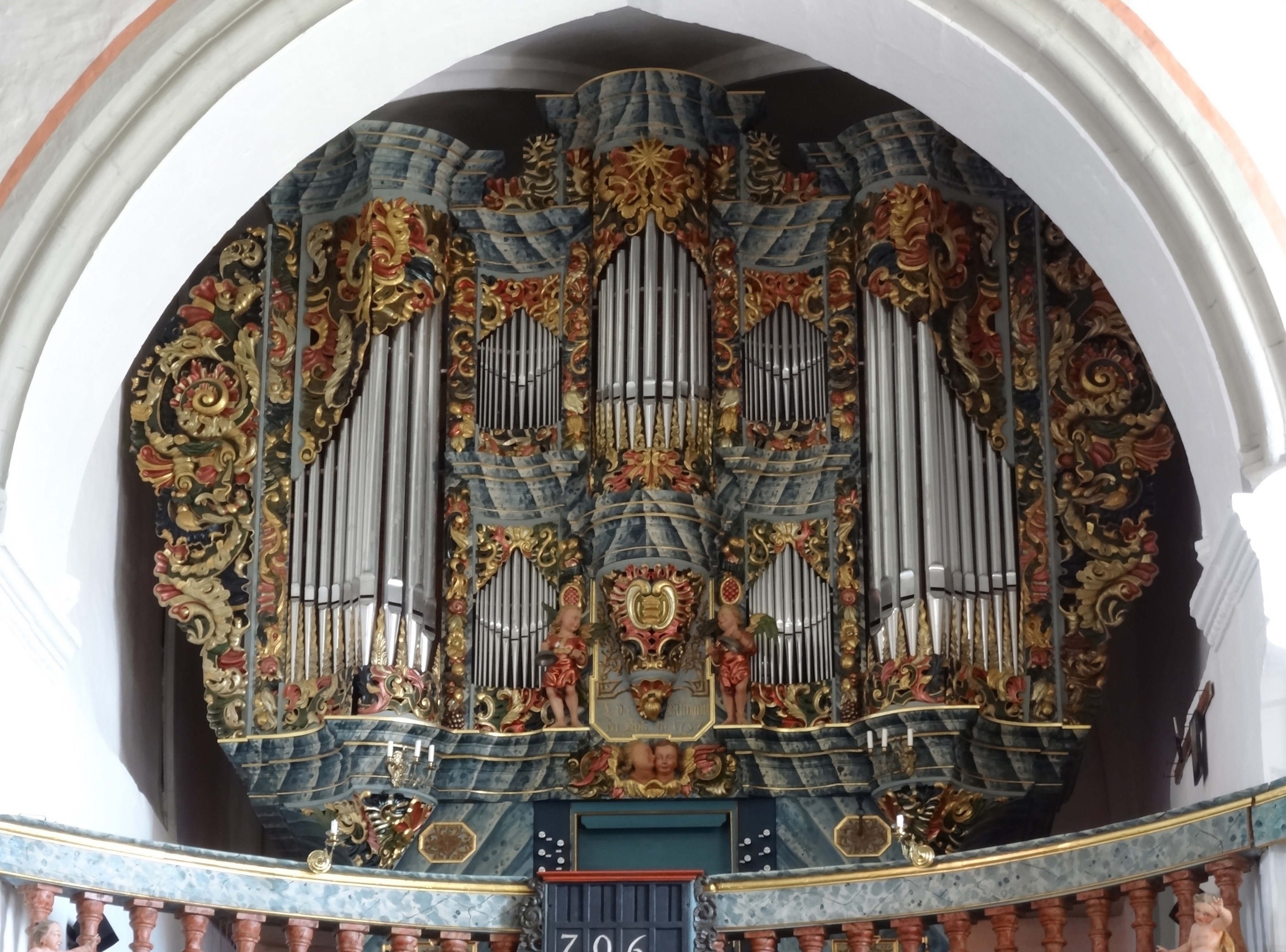 Anstelle der kleinen einmanualigen Vorgänger-Orgel von Johann Moritz Weise von 1668 leisteten sich die Herpfer ein größeres Instrument und verkauften die Vorgängerorgel an die Marienkirche in Seeba. Beide Arbeiten, den Neubau in Herpf 1752 - 1756 und den Umbau in Seeba 1754 führte Orgelbaumeister Johann Caspar Rommel aus Roßdorf/Rhön durch. 1999 - 2002 erfolgte durch Hoffmann & Schindler Orgelbau eine Restaurierung. Die Herpfer Orgel gilt als typisches Beispiel südthüringischer barocker Orgelbaukunst mit ausgesprochener Klangvielfalt und Klangschönheit. Die reichen, vergoldeten Schnitzereien des Prospekts stammen wie die Farbfassung insgesamt von den Hofmalern Johann Jacob Prazzo und Johann Jacob Gehres aus Meiningen.